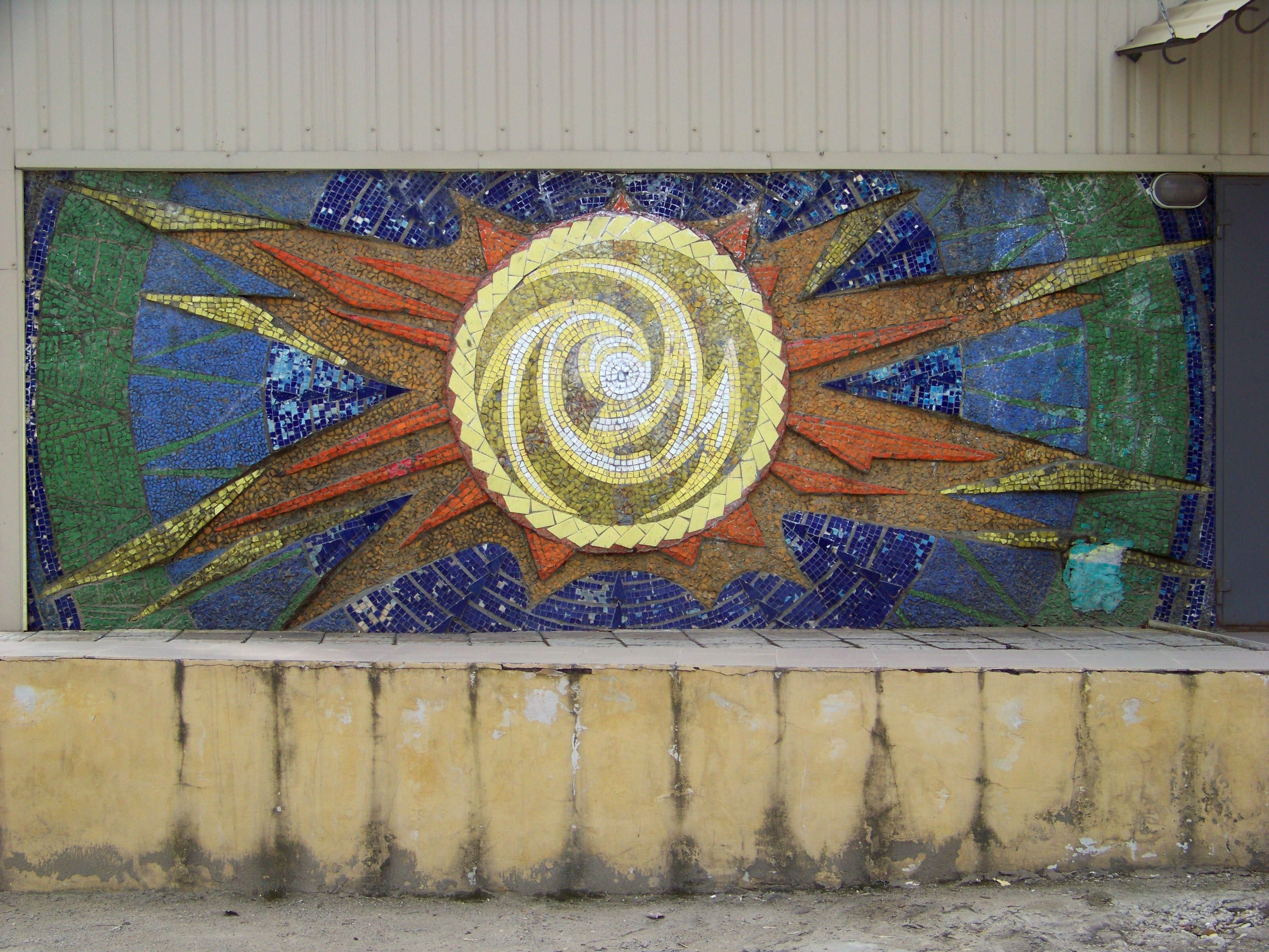 Мозаїка "Сонце" на школі № 5 у місті Донецьку.